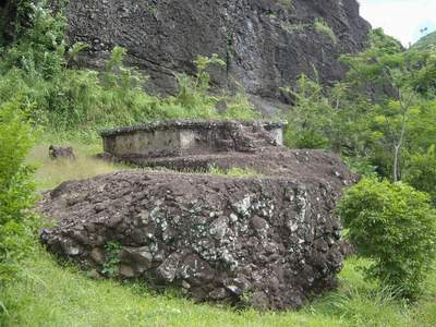 Bagian dari Candi Meja, Boyolangu, Kabupaten Tulungagung, Jawa Timur